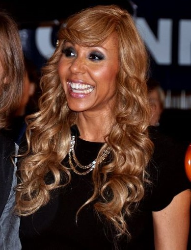 Cathy Guetta aux NRJ Music Awards